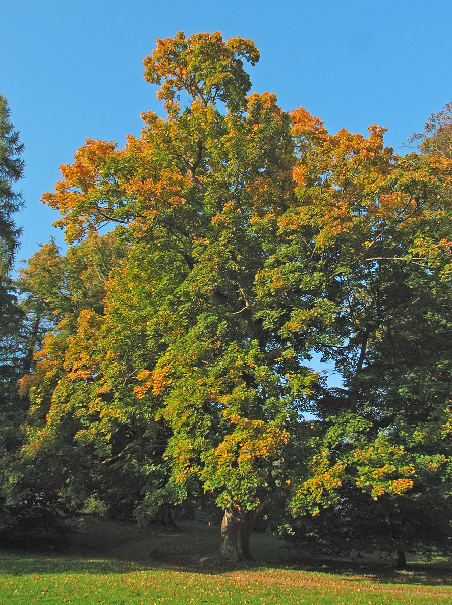 Beschreibung: Spitz-Ahorn / Norway maple (Acer platanoides) Fotograf: Darkone, 12. Oktober 2005